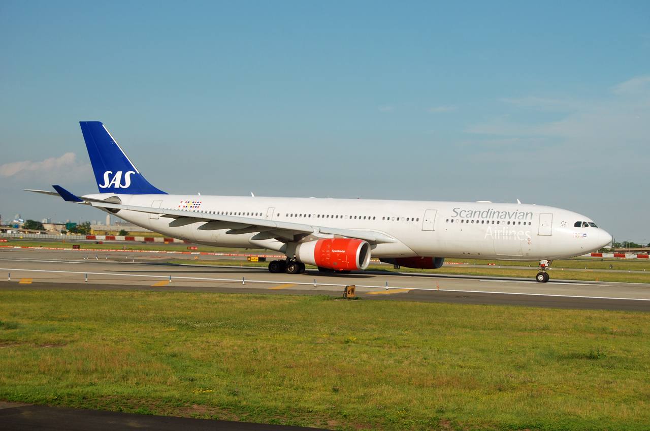 SAS